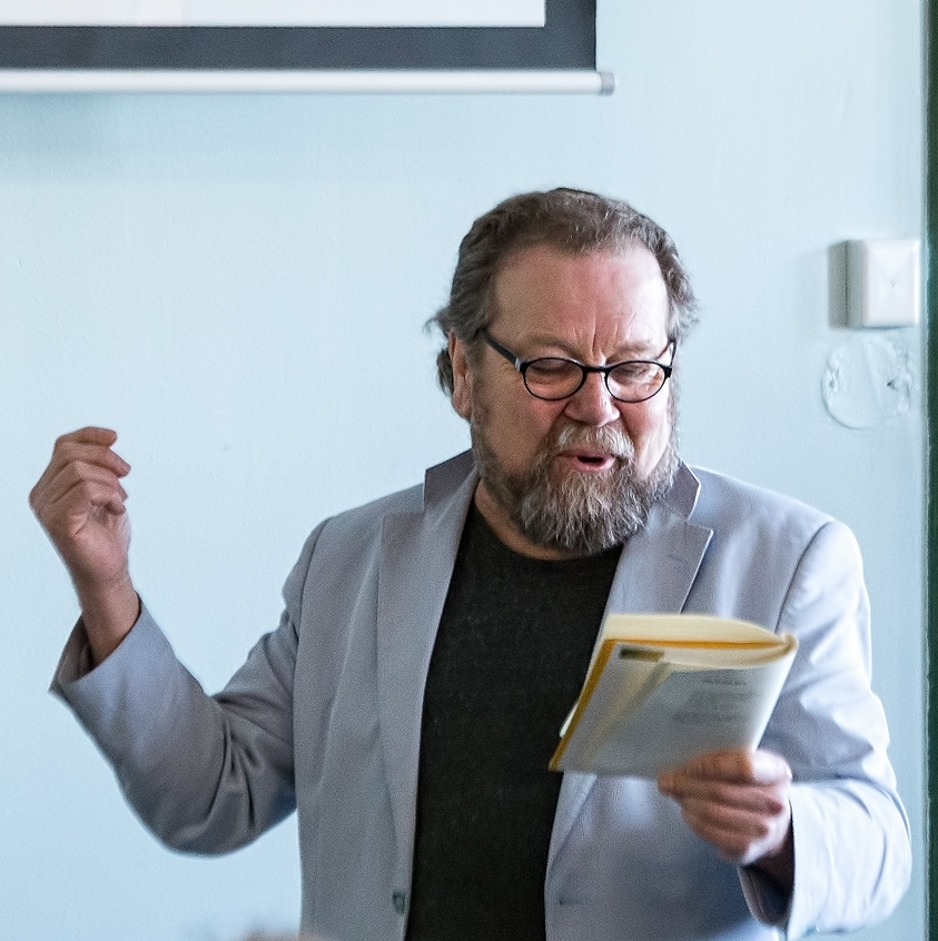 stig_holmås-006